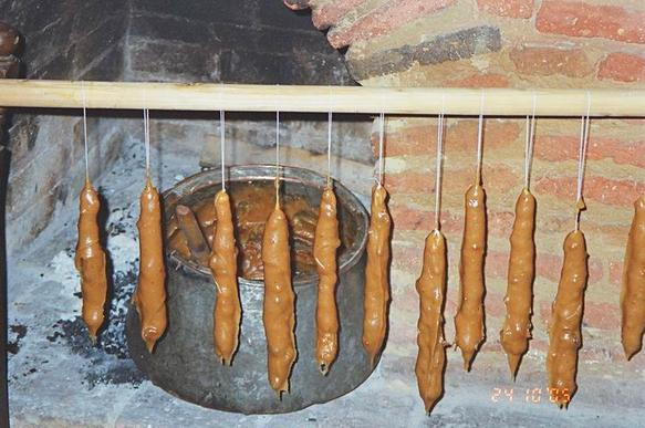 Tschurtschchela, Walnüsse mit Traubensaft-Kouvertüre, Georgien